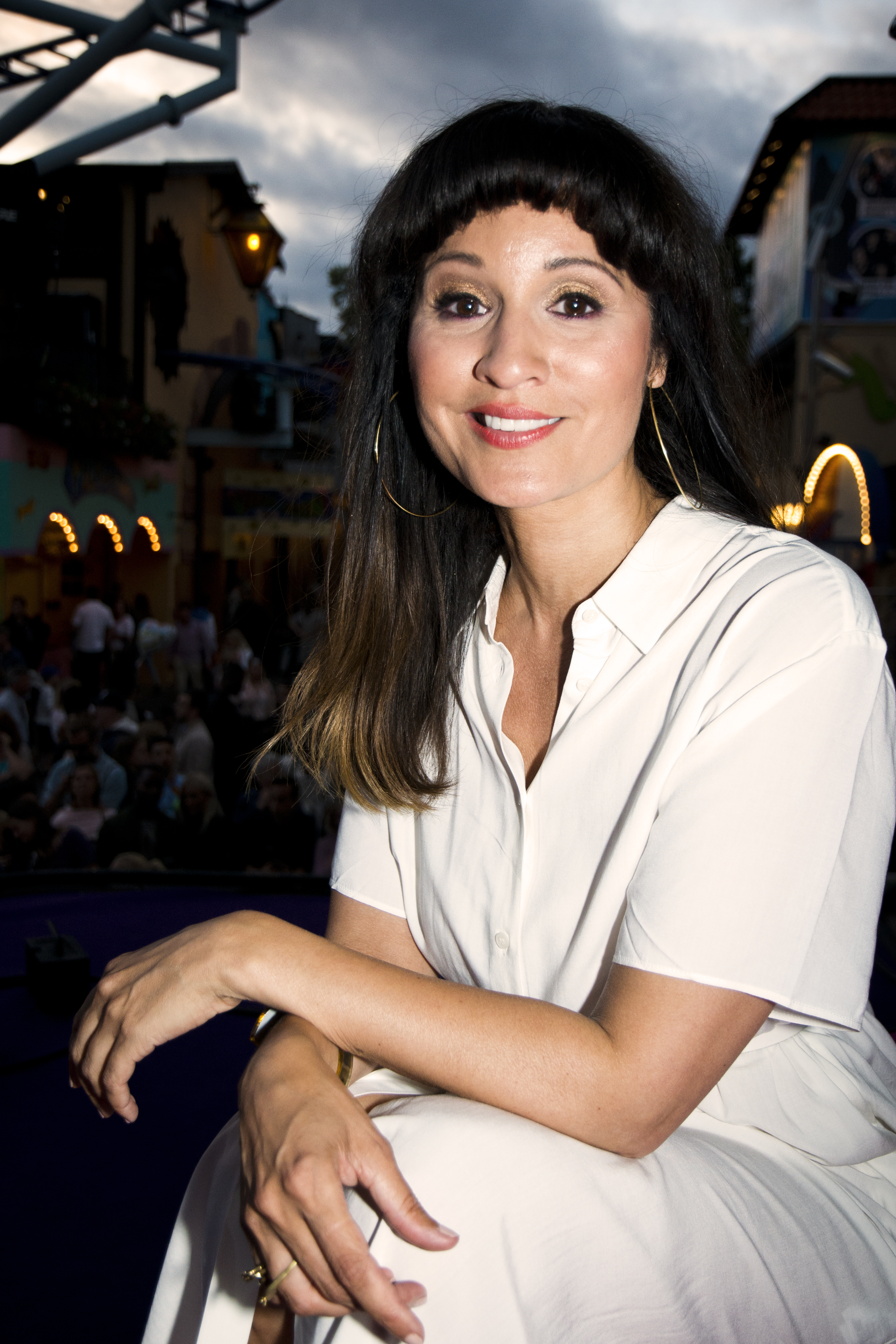 Jennifer Brown på Sommarkrysset, Gröna Lund, Stockholm